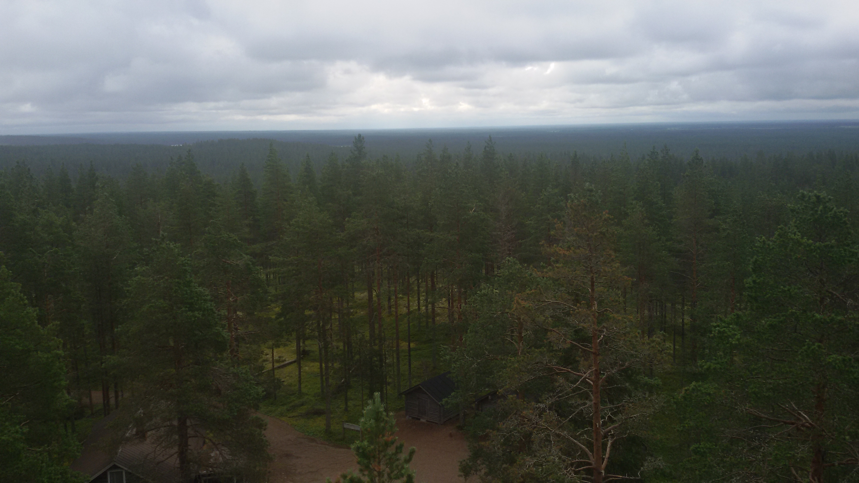 Pookivaara kalva Rokua nacionaliniame parke